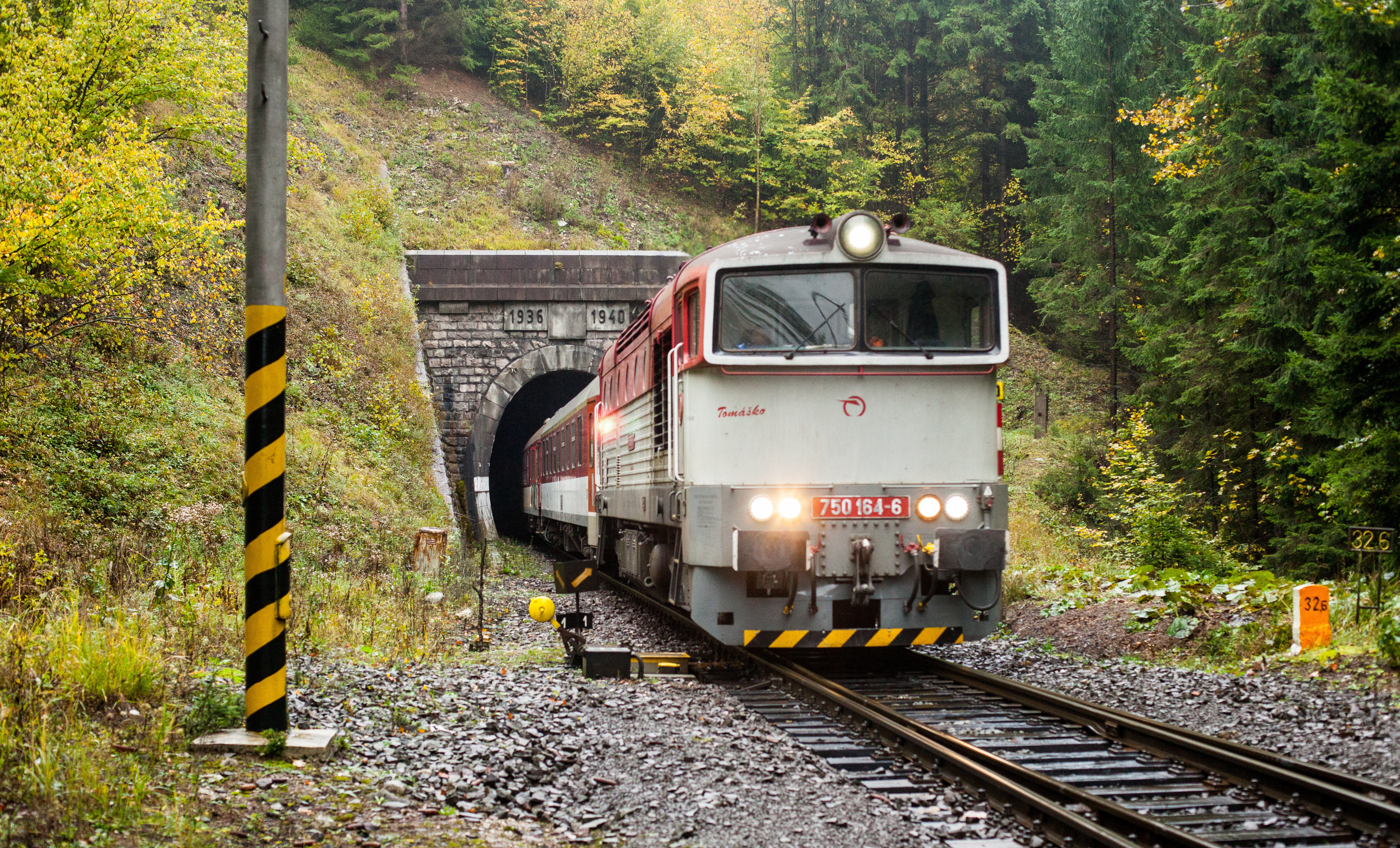 8.10.2017, 750 164-6, R342 vchádza do stanice Čremošné.